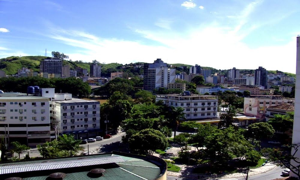 Vista parcial do centro de Barra Mansa, a partir do bairro Ano Bom.